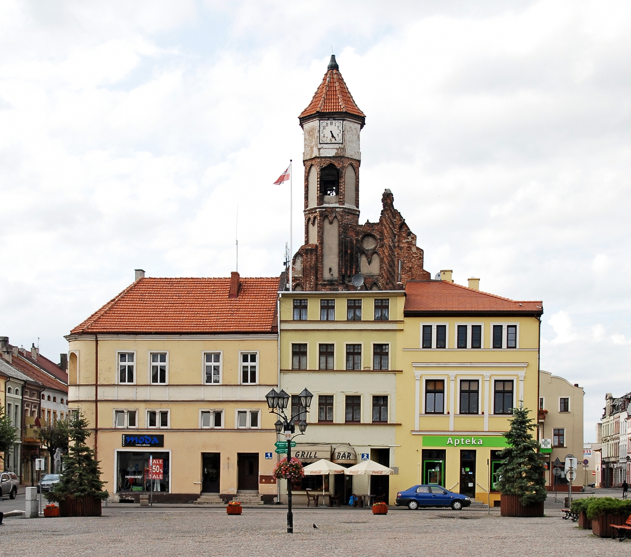 Rynek w Brodnicy, na pierwszym planie figura ułana.